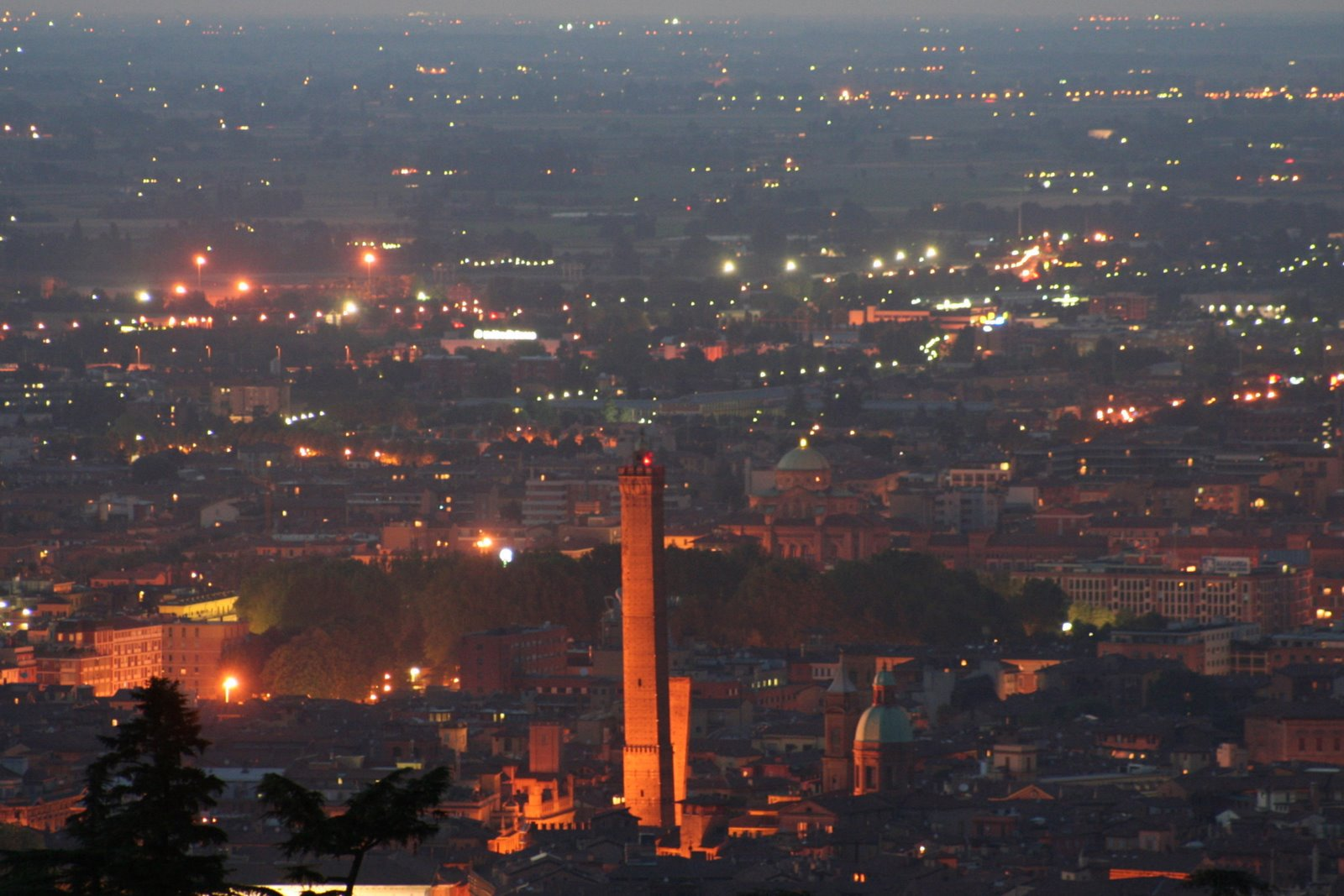 Scorci della città in particolare dalla collina This is a photo of a monument which is part of cultural heritage of Italy.